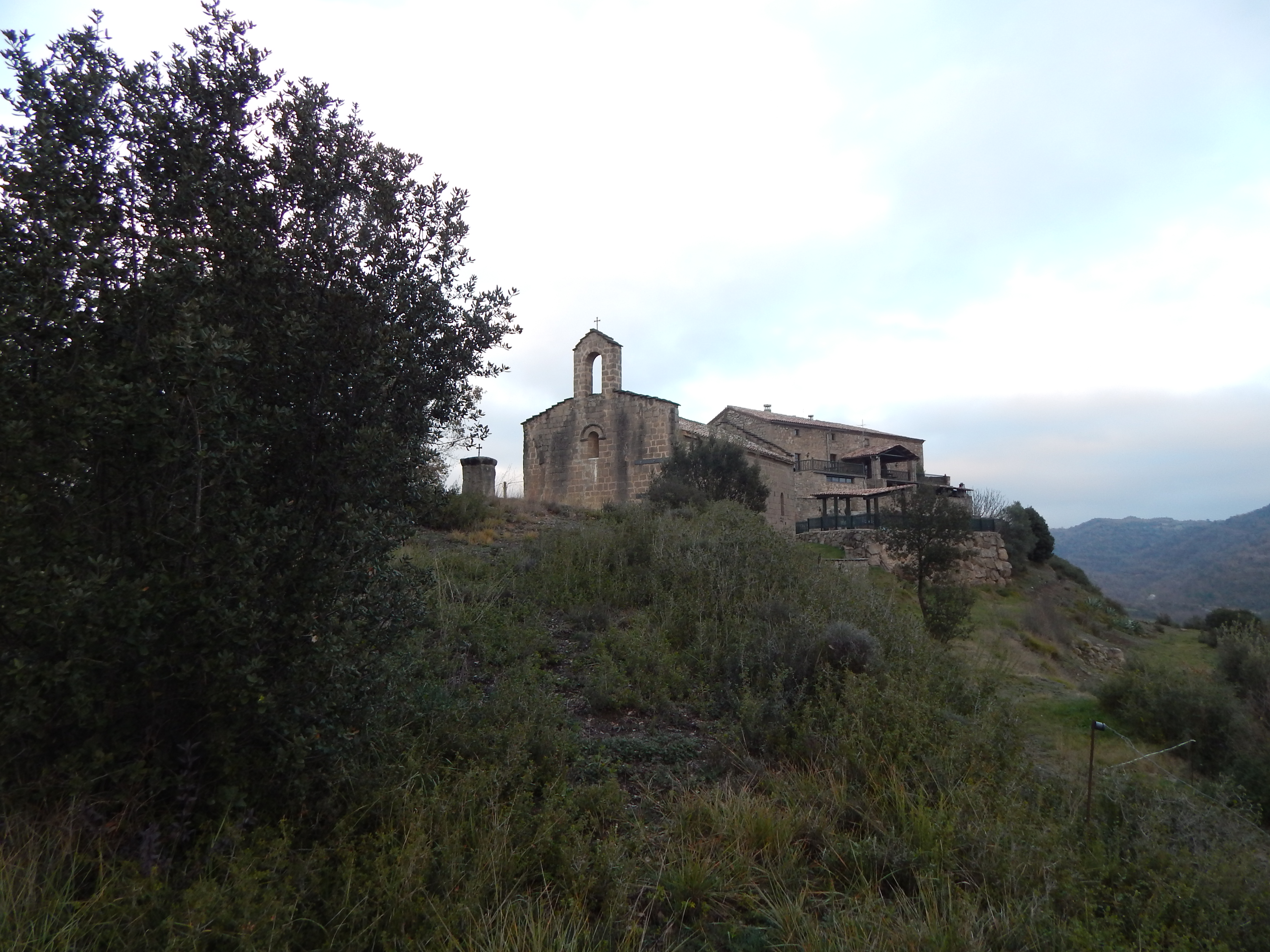 Vista de Sant Martí de Biure i de la Sala de Biure des de baix, cara occidental.